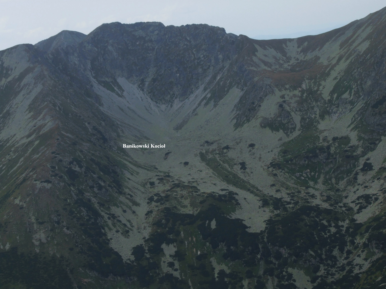 Banówka